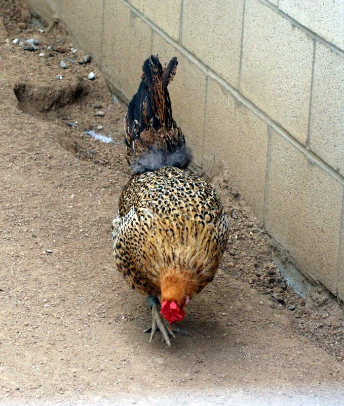 Buttercup (chicken)